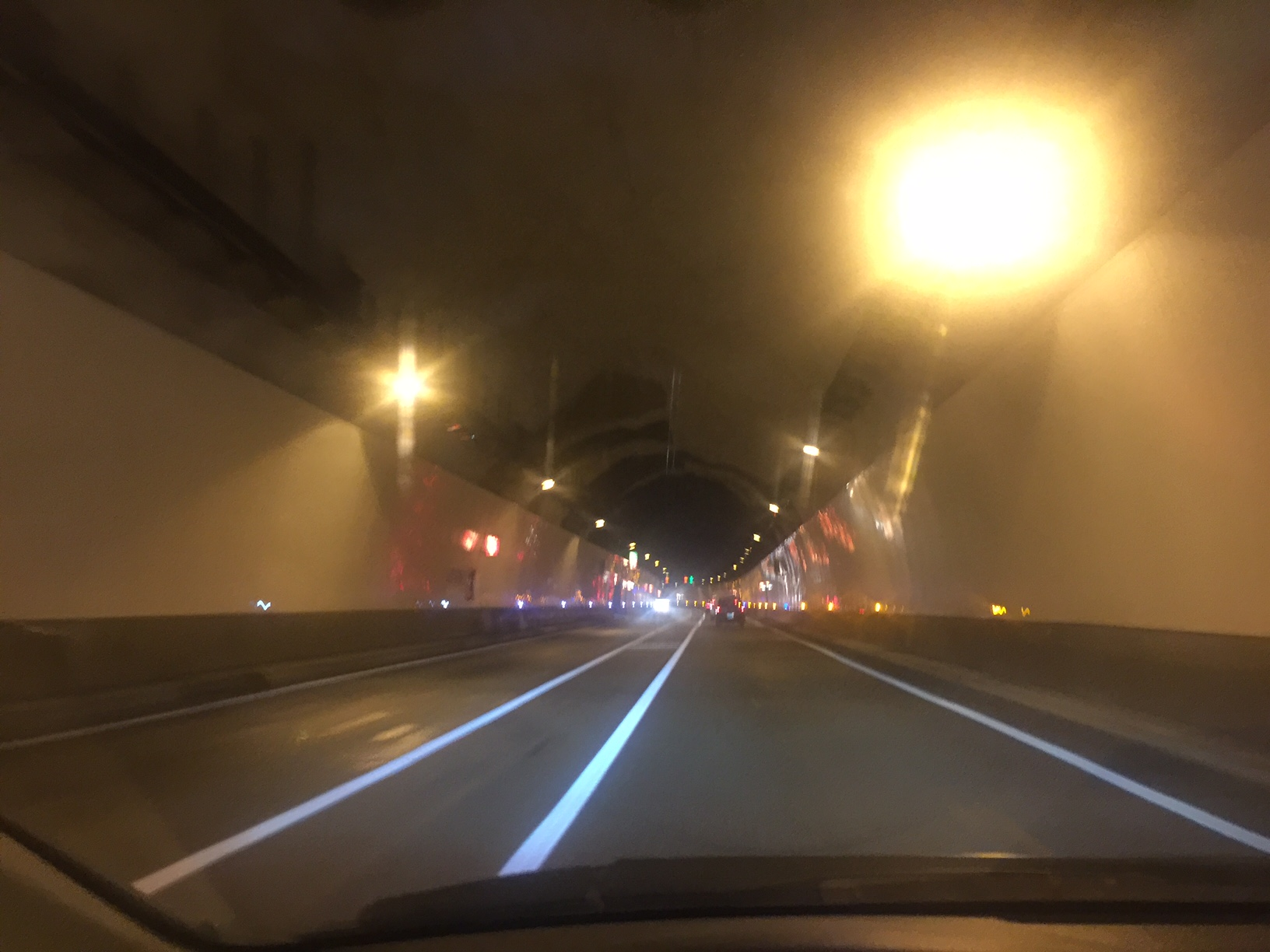 El túnel de Pont Pla une La Massana y Andorra la Vella